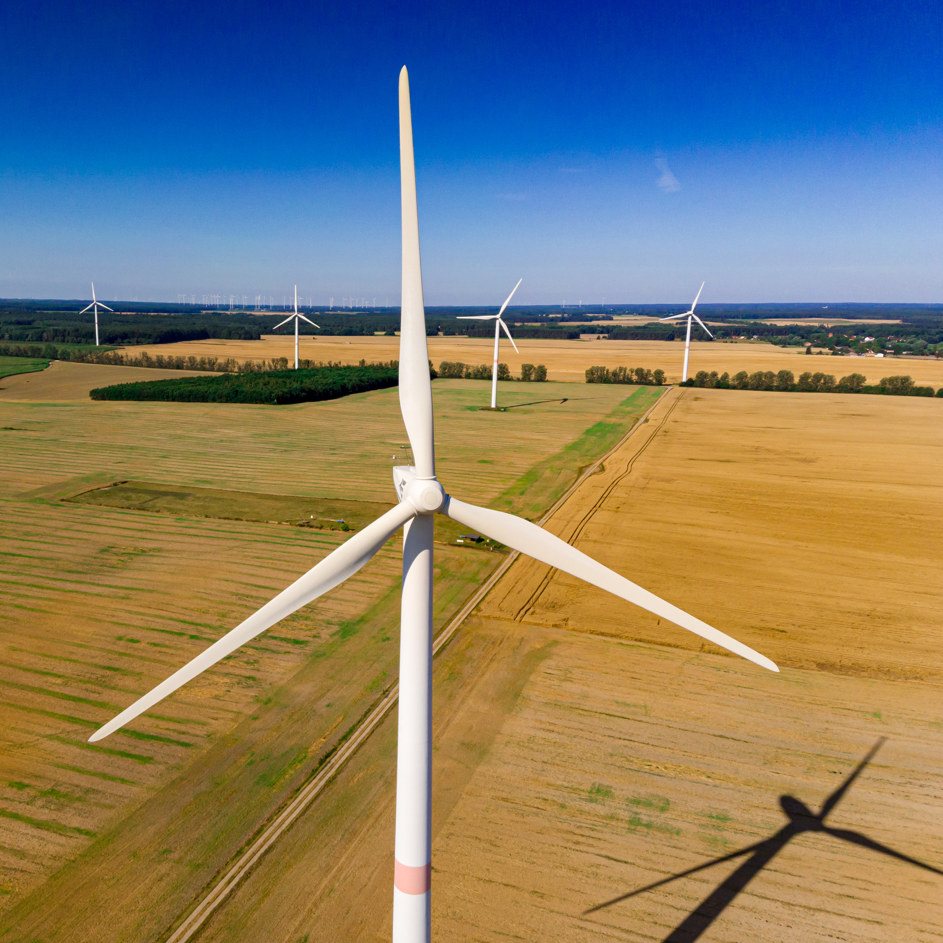 Windkraftanlagen bei Trampe (Breydin), Windpark Heckel­berg-Brunow/Breydin